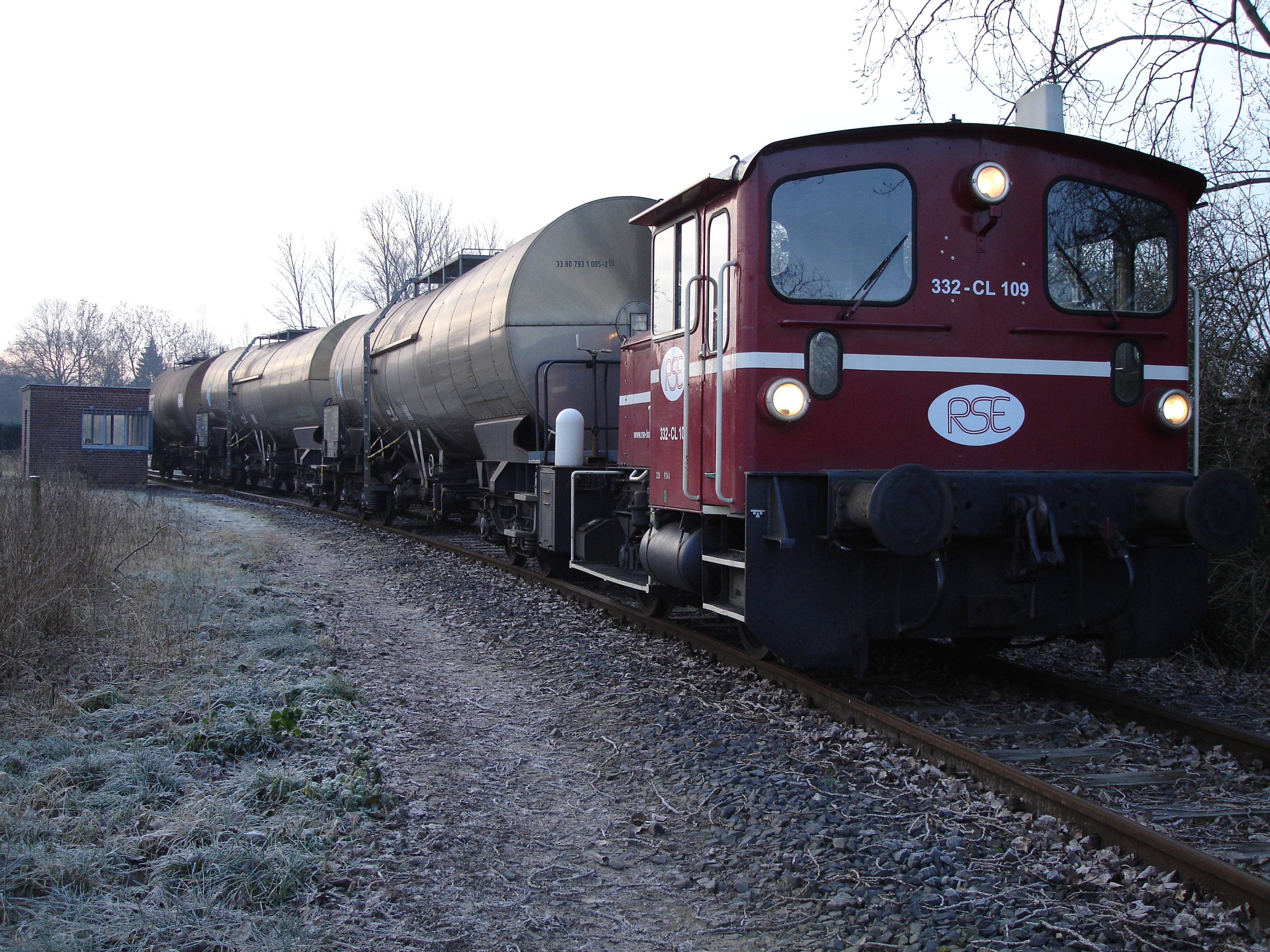 Zug, (ehemalige Kleinlok "Köf 11 109" der DB)